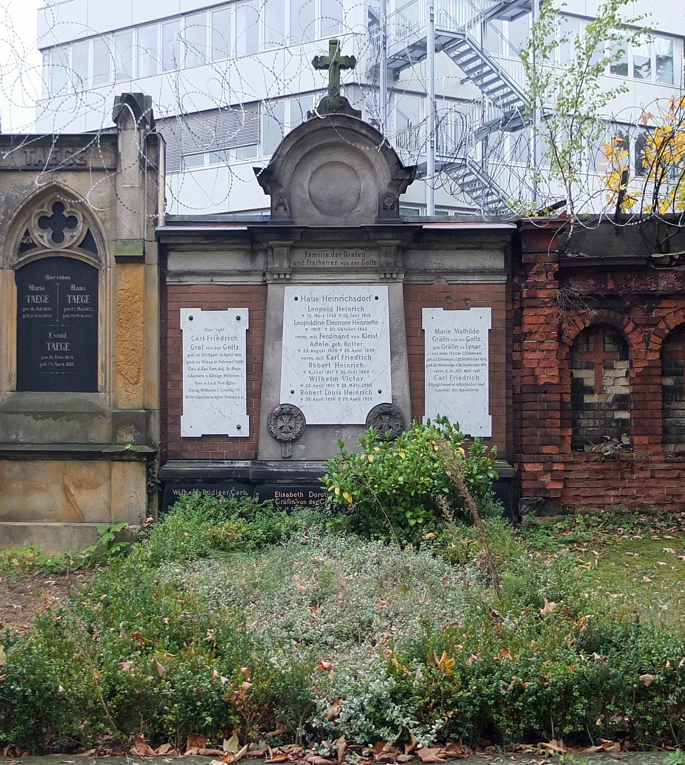 Grab von Carl Friedrich von der Goltz auf dem Luisenfriedhof II in Berlin-Westend. Obwohl seit 1997 Ehrengrab des Landes Berlin fehlt die Ehrengrabkennzeichnung.